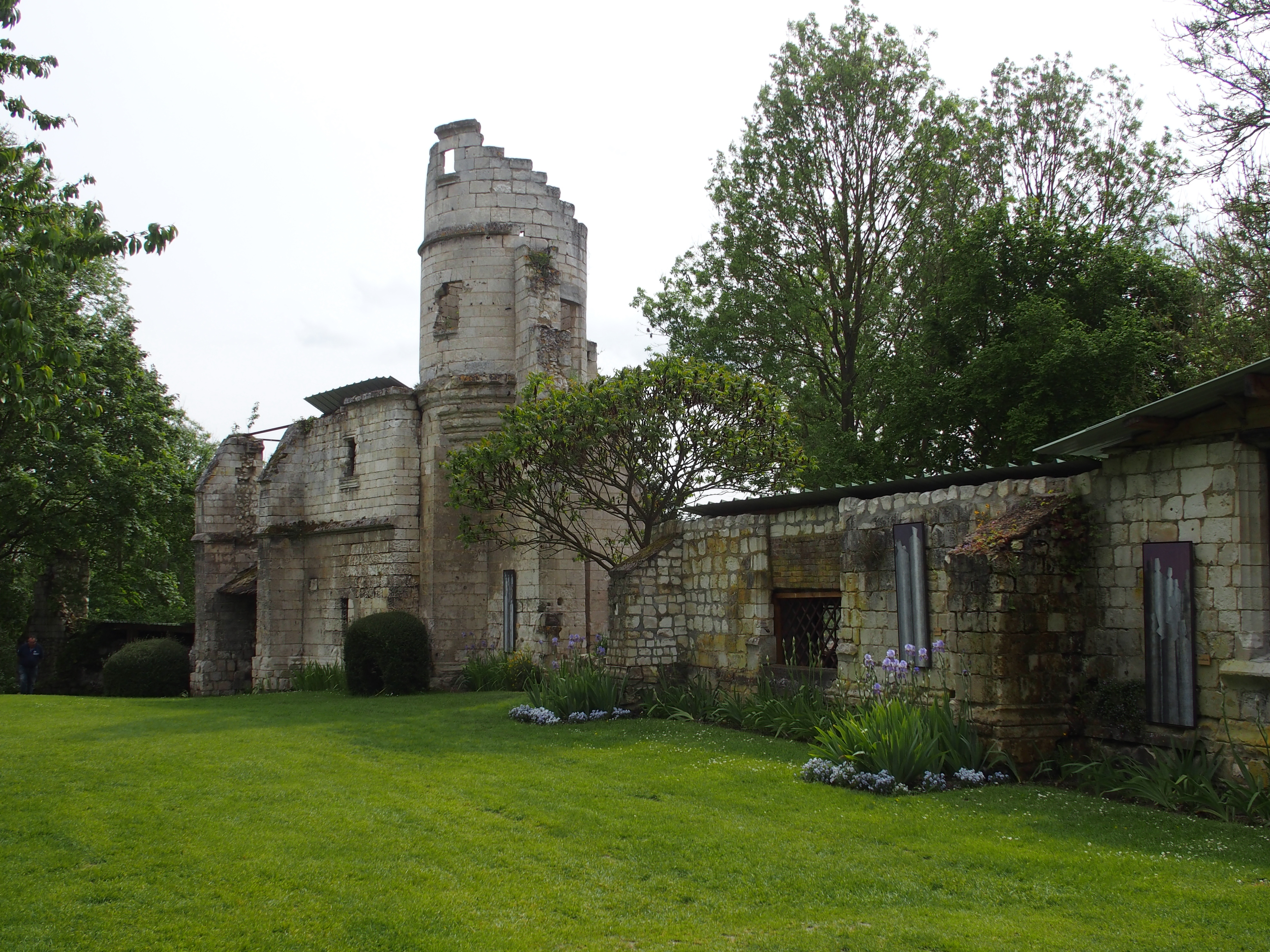 L'abbaye de Moreaucourt en 2016